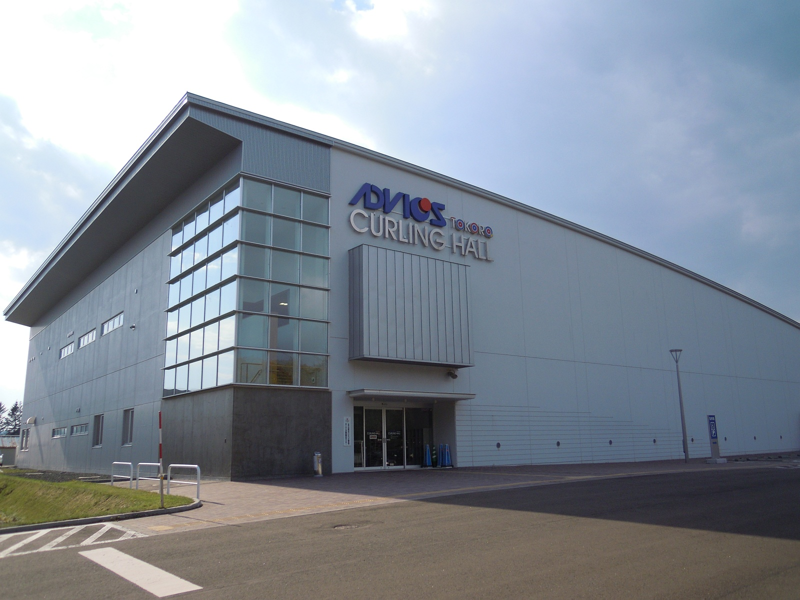 北海道北見市常呂町にある北見市常呂町カーリングホール。命名権により、撮影時の名称は「アドヴィックス常呂カーリングホール」。